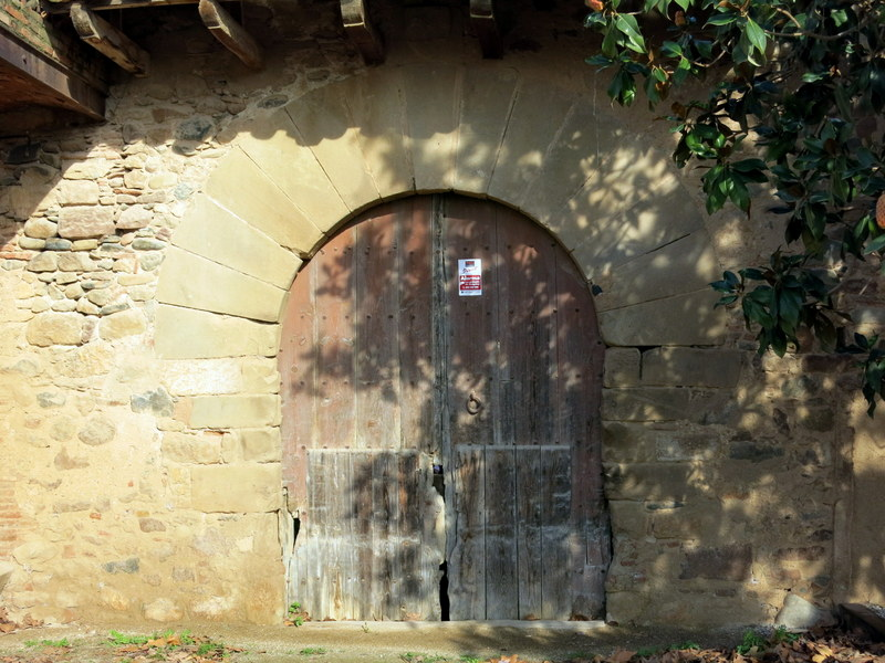 Casal Rosanes a La Garriga - Catalunya